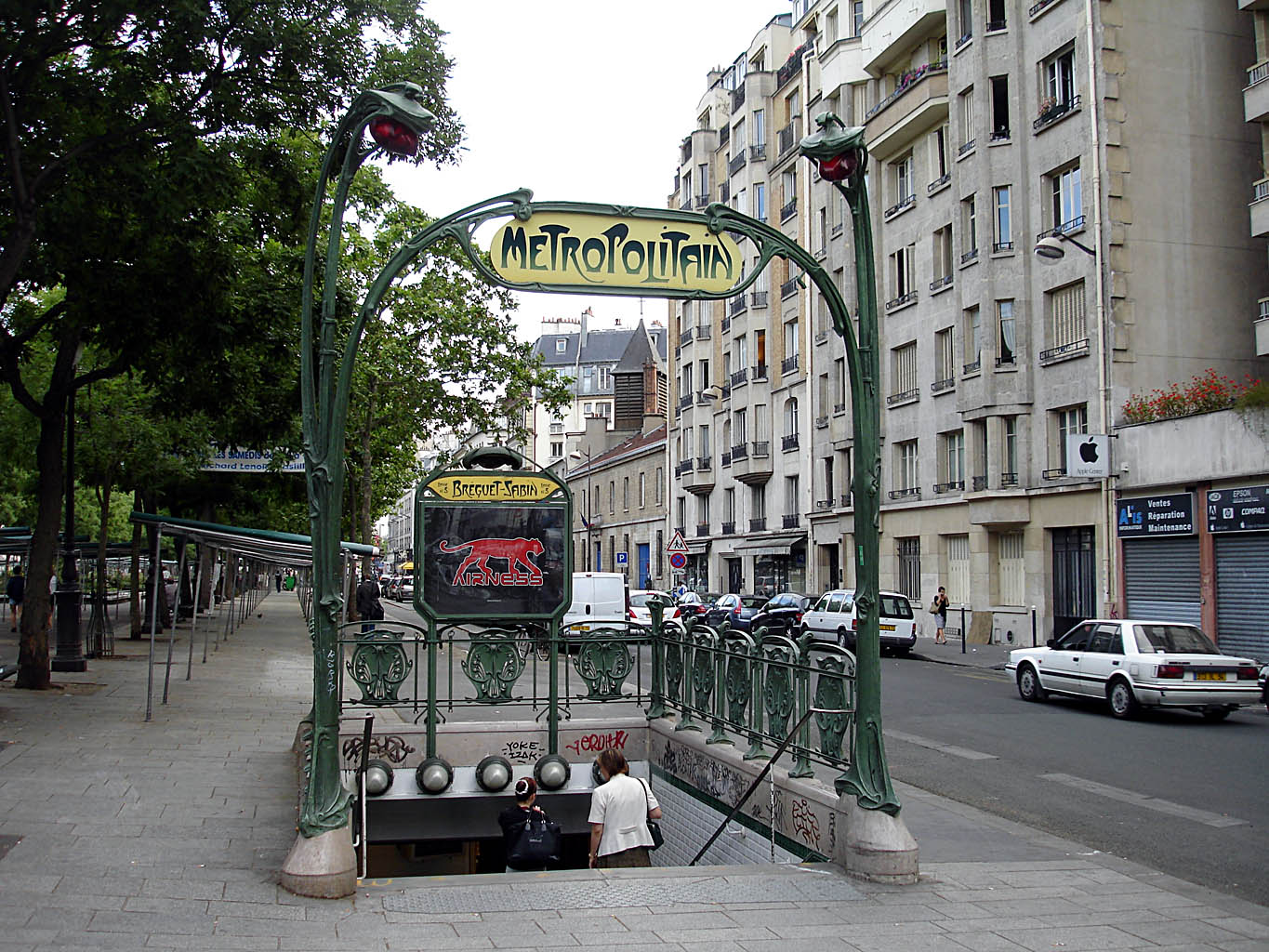 La station Bréguet - Sabin de la ligne 5 du métro de Paris, France